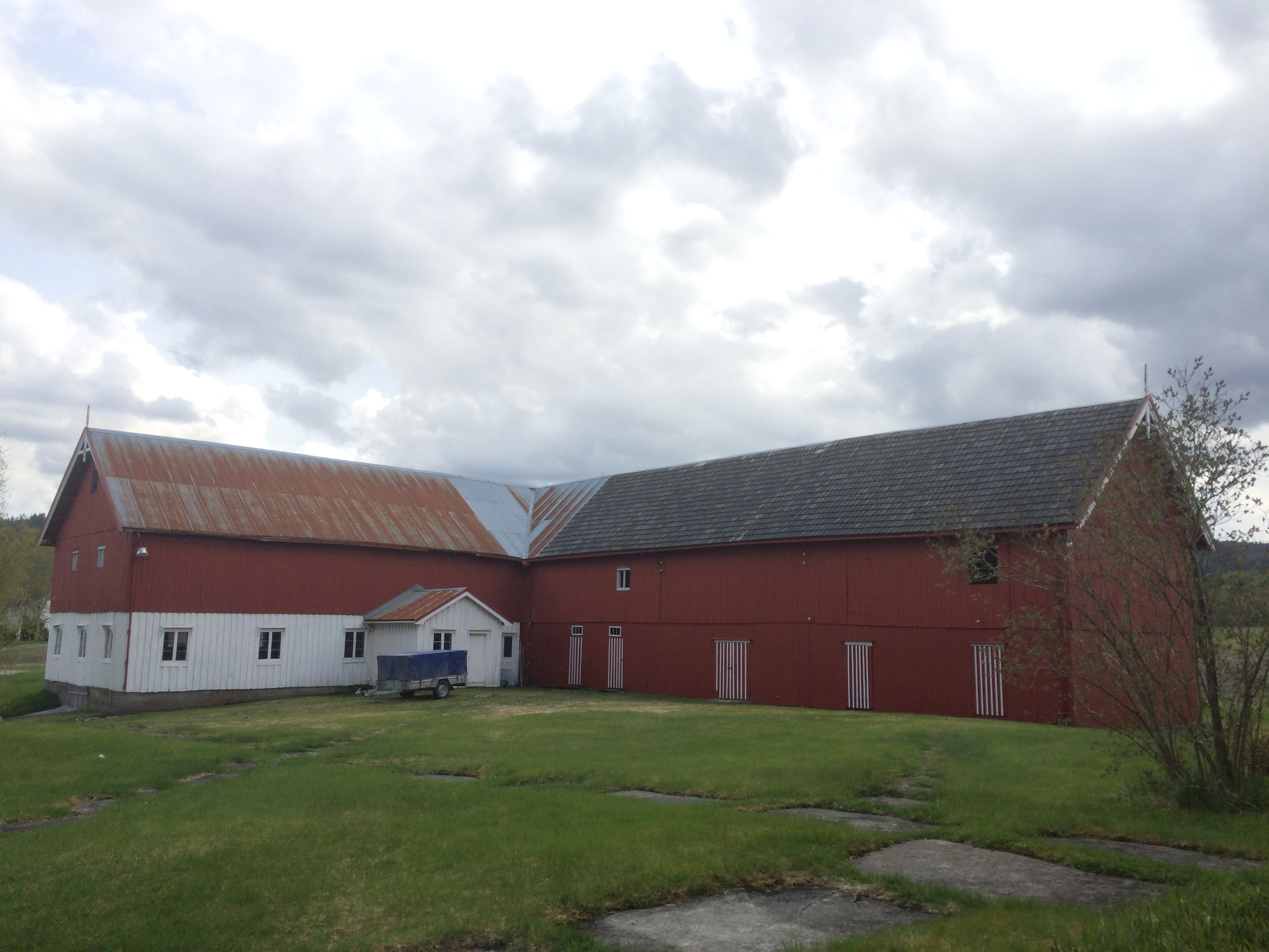 Driftsbygningen på Gjesvål, Orkdal kommune